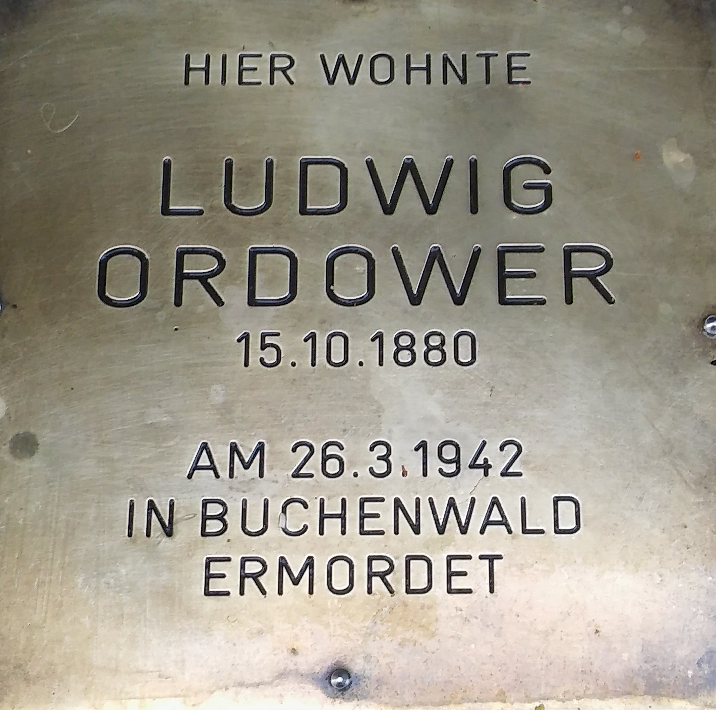 Steine der Erinnerung Wien-Liesing, Ludwig Ordower, Kaserngasse 22, 1230 Wien